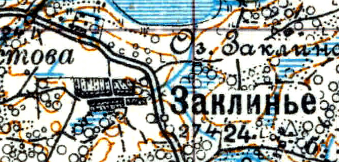 Топографическая карта Ленинградской области, квадрат Vc-29 (Батецкая), деревня Заклинье